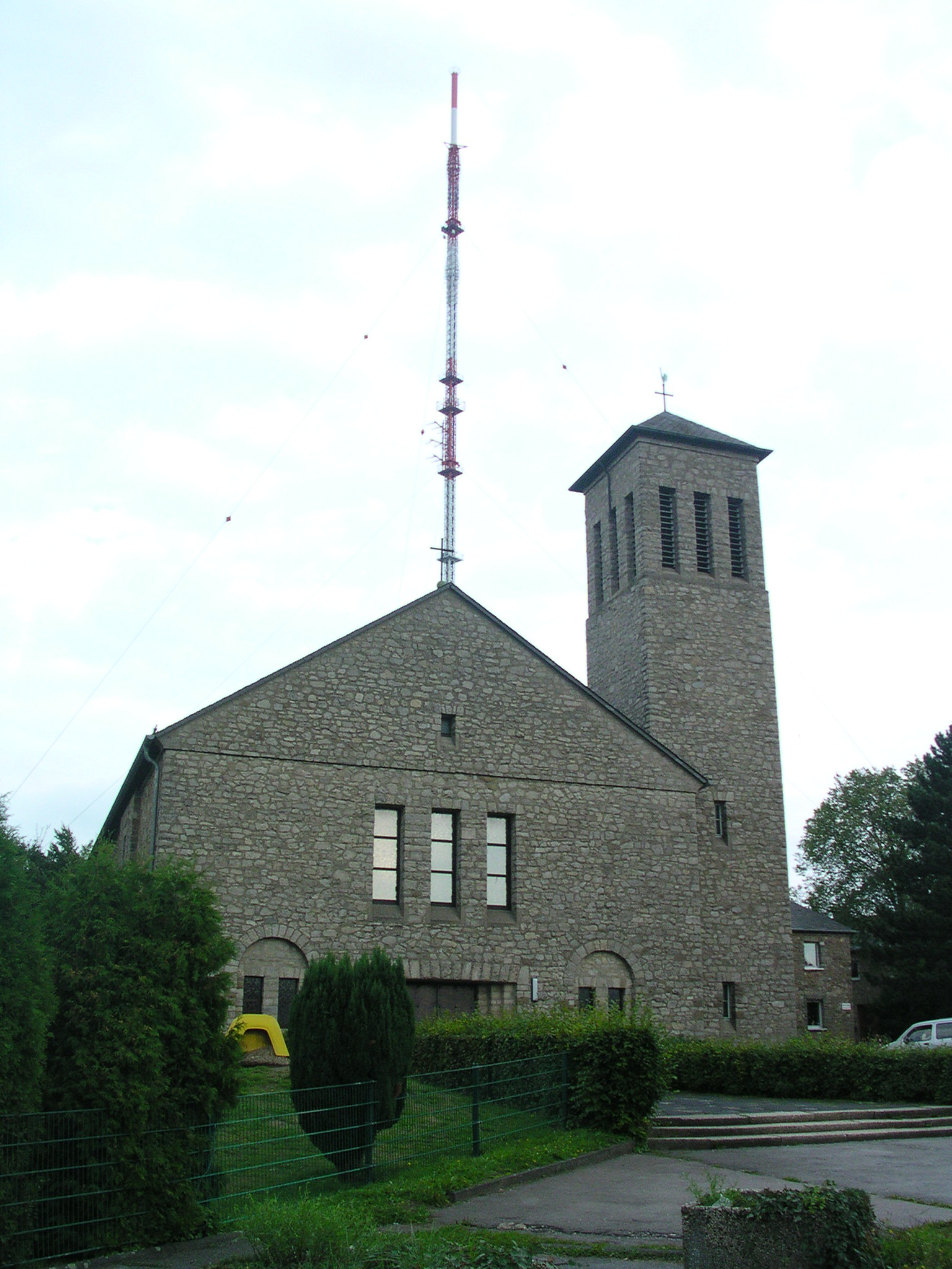 Stolberg Donnerberg, rk. Josefskirche